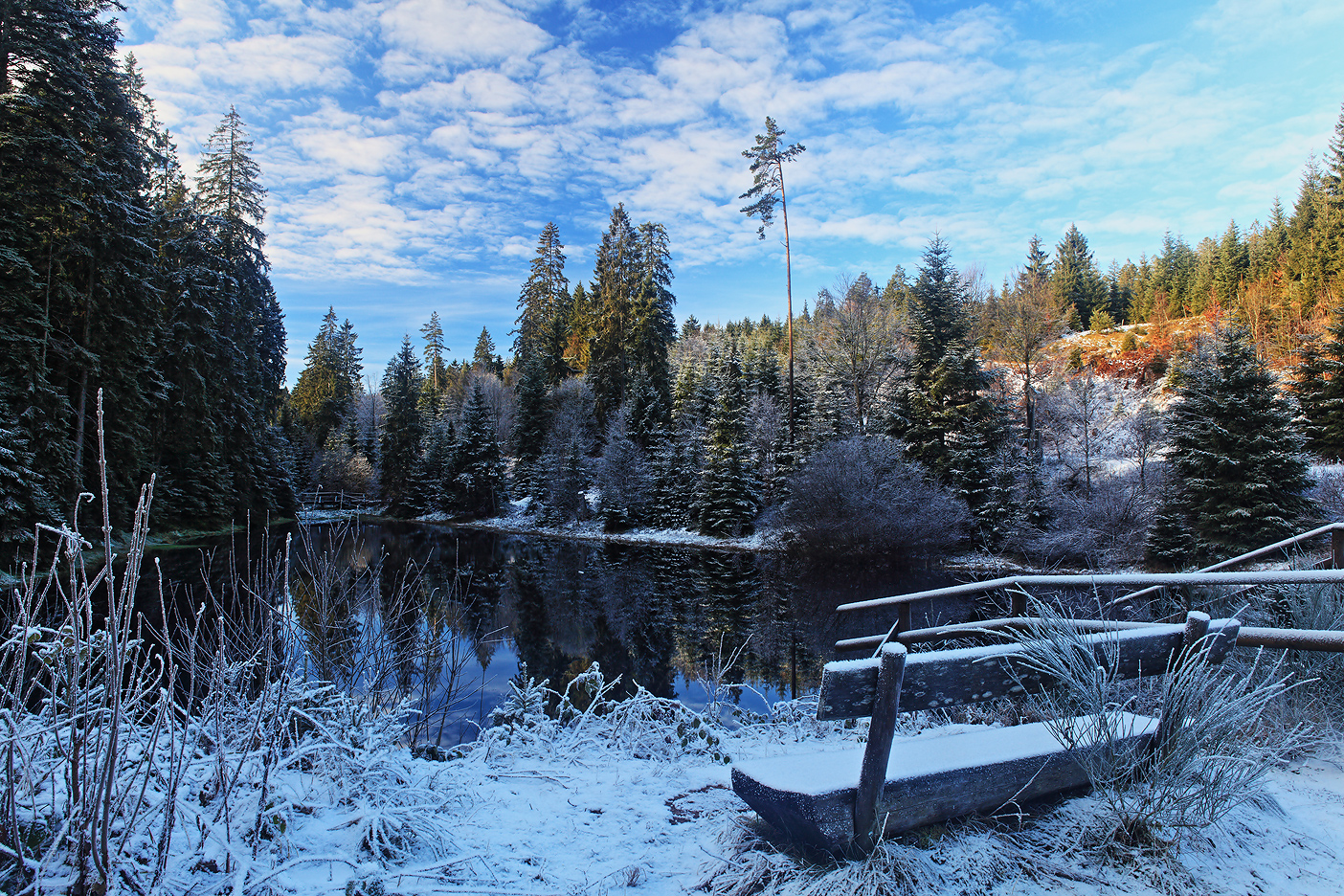 Blick vom Damm über den winterlichen Kaltenbachsee bei Enzklösterle-Gompelscheuer